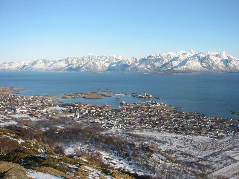 Tettstedet Melbu i Nordland, sett fra Haugnyken.